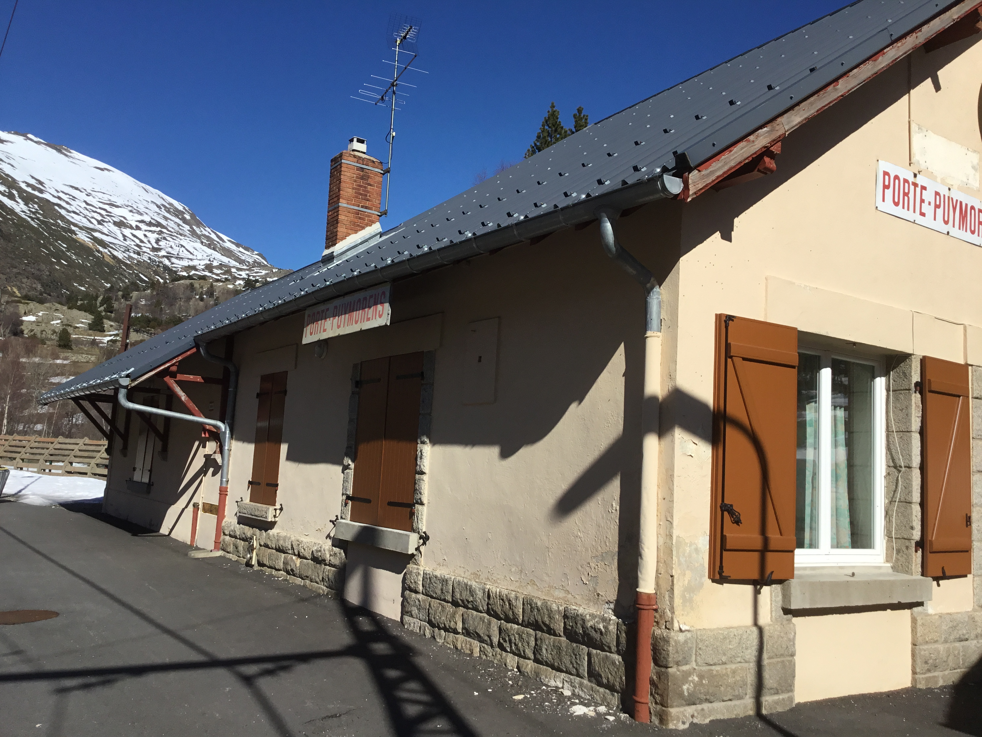 Bâtiment principal de la gare de Porté-Puymorens.